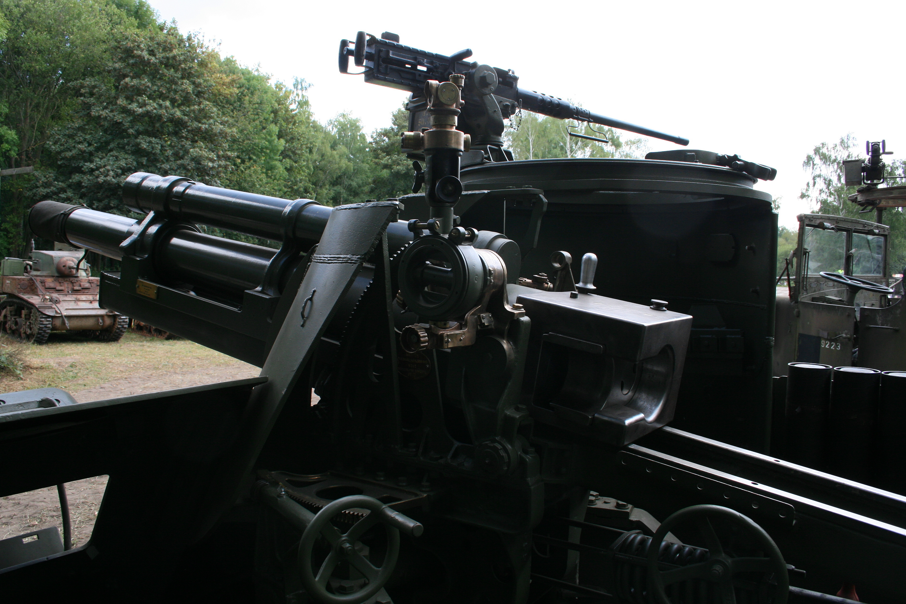 obusier de 105 mm M2 et mitrailleuse HB M2 de 12,7 mm équipant le canon automoteur M7 Priest